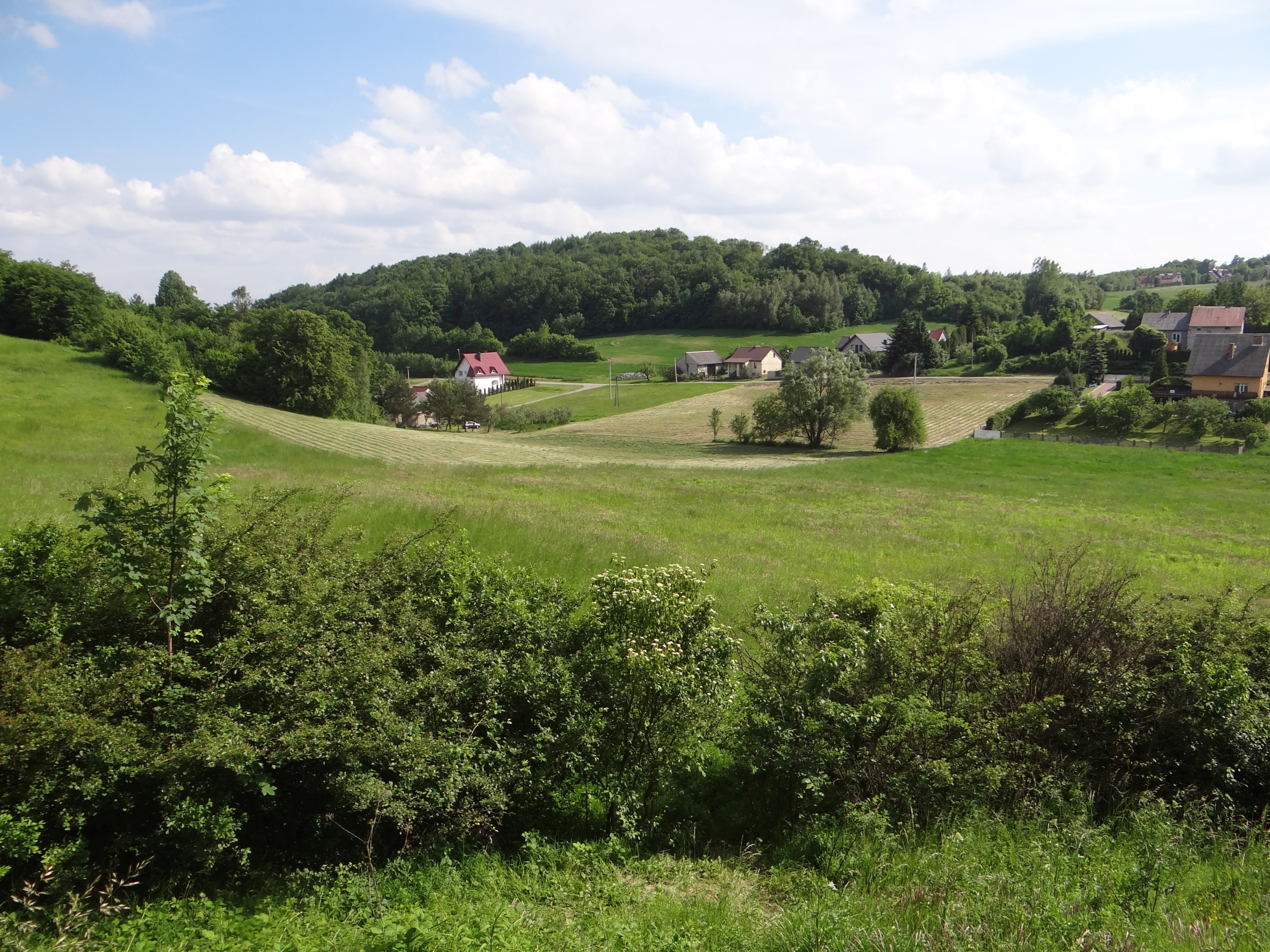 Wzniesienie Jedlina w Jerzmanowicach